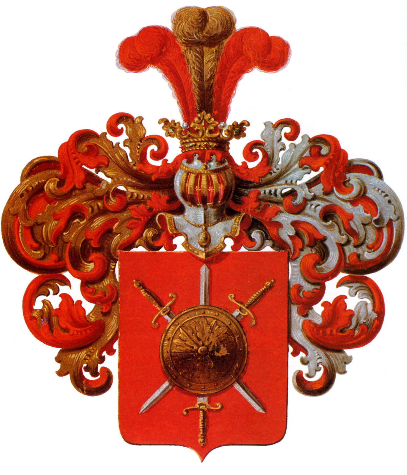 Герб рода Кривошеиных